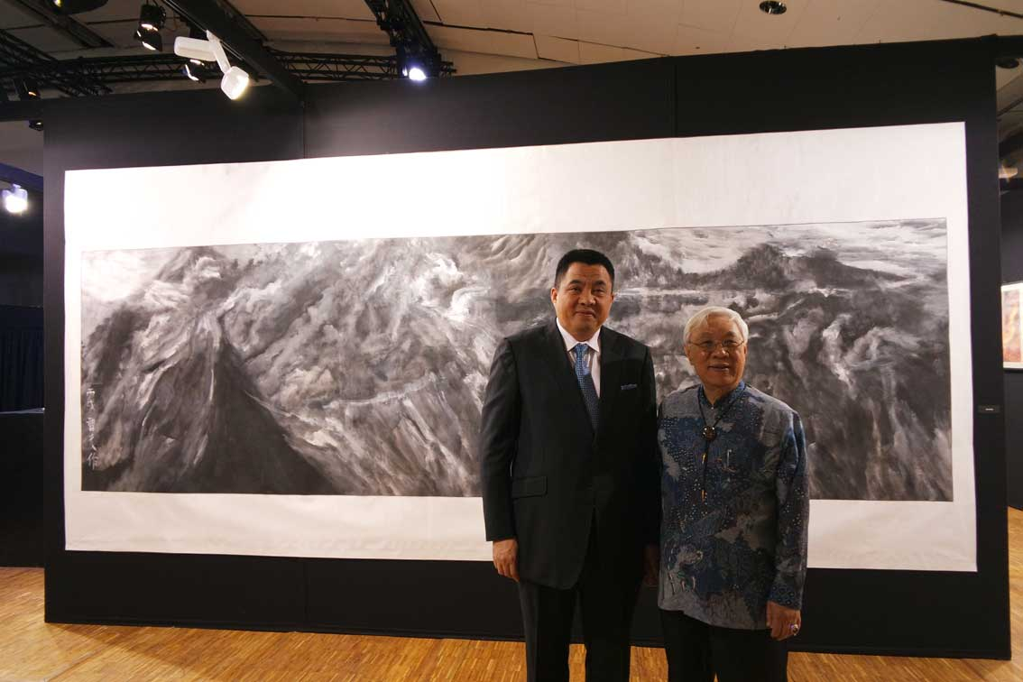 Lukisan Sidik berjudul "Jalan" yang memenangkan penghargaan di Louvre, Prancis, 2014